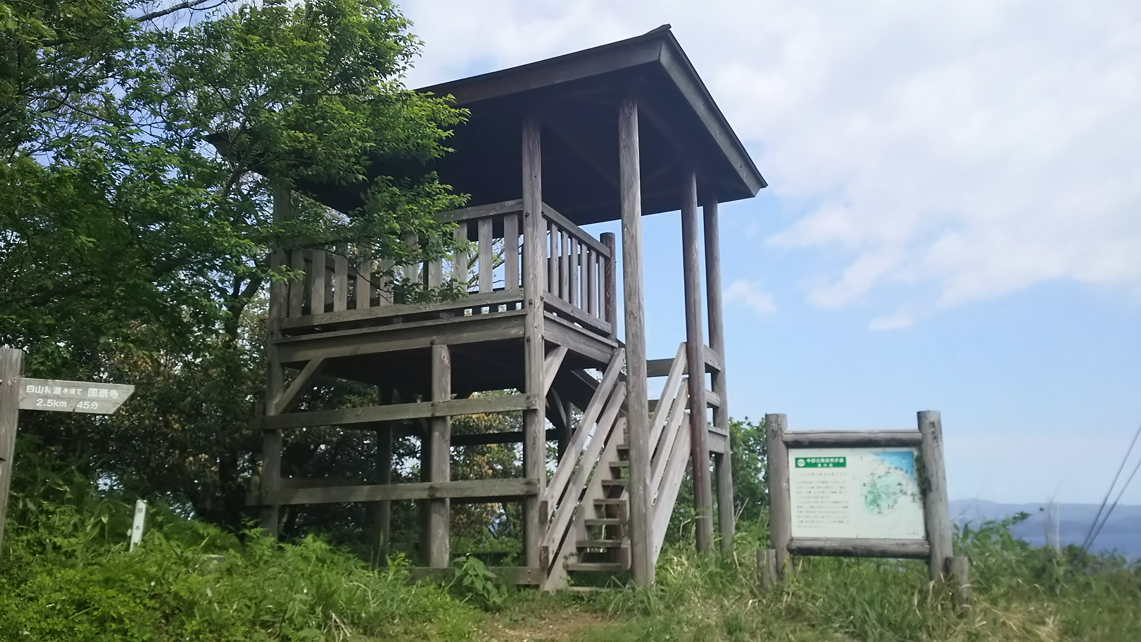 大師ヶ岳山頂に新設された展望台。